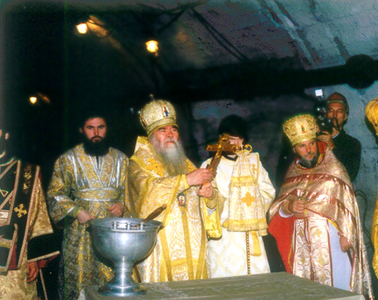 Lugansk orthodox metropolitan Иоанникий (Кобзев) in a mine (Ukraine)